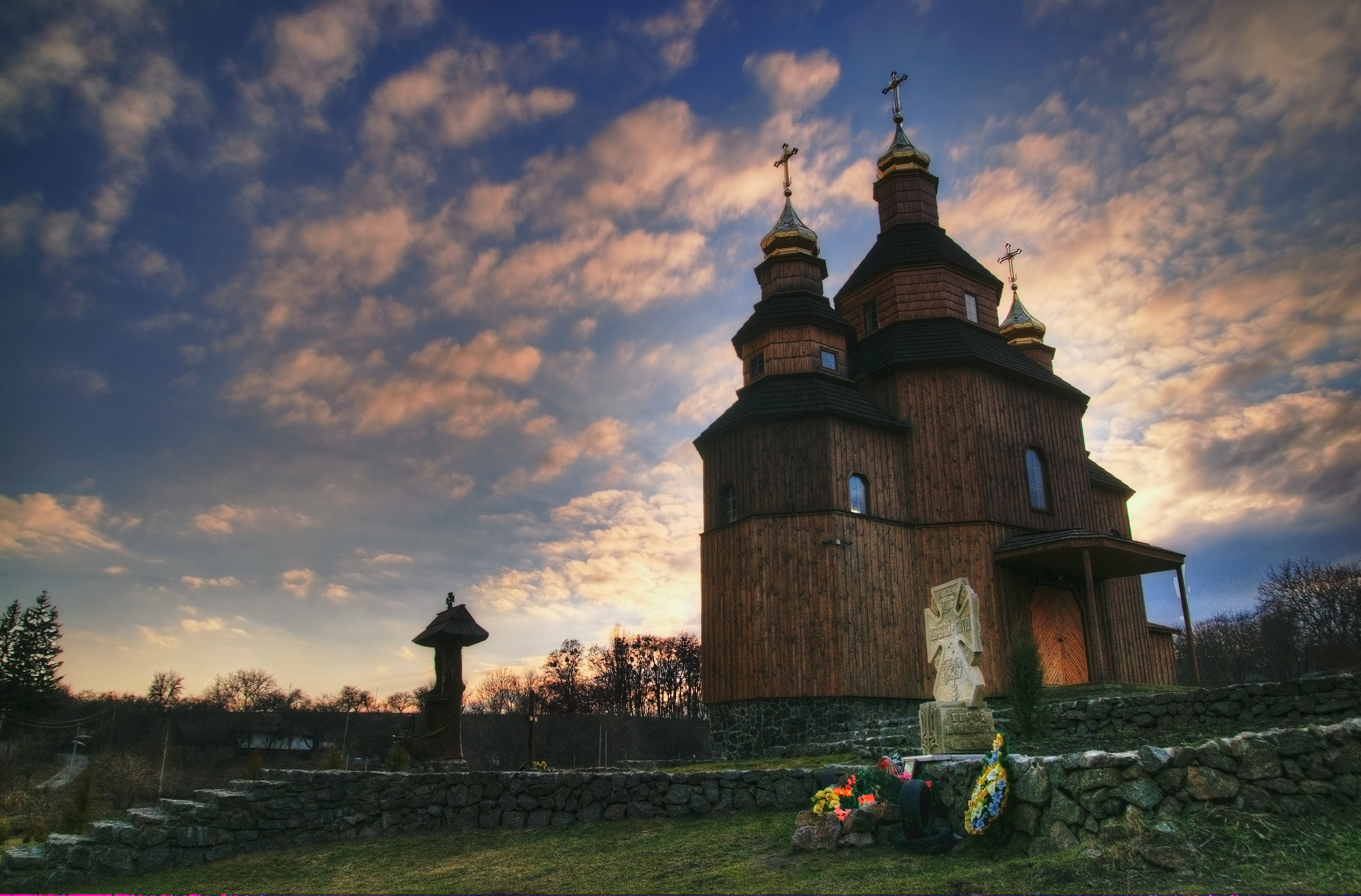 Храм Святого Праведного Петра Багатостраждального (Калнишевського), Холодний Яр, Чигиринського р-ну, Черкаської обл